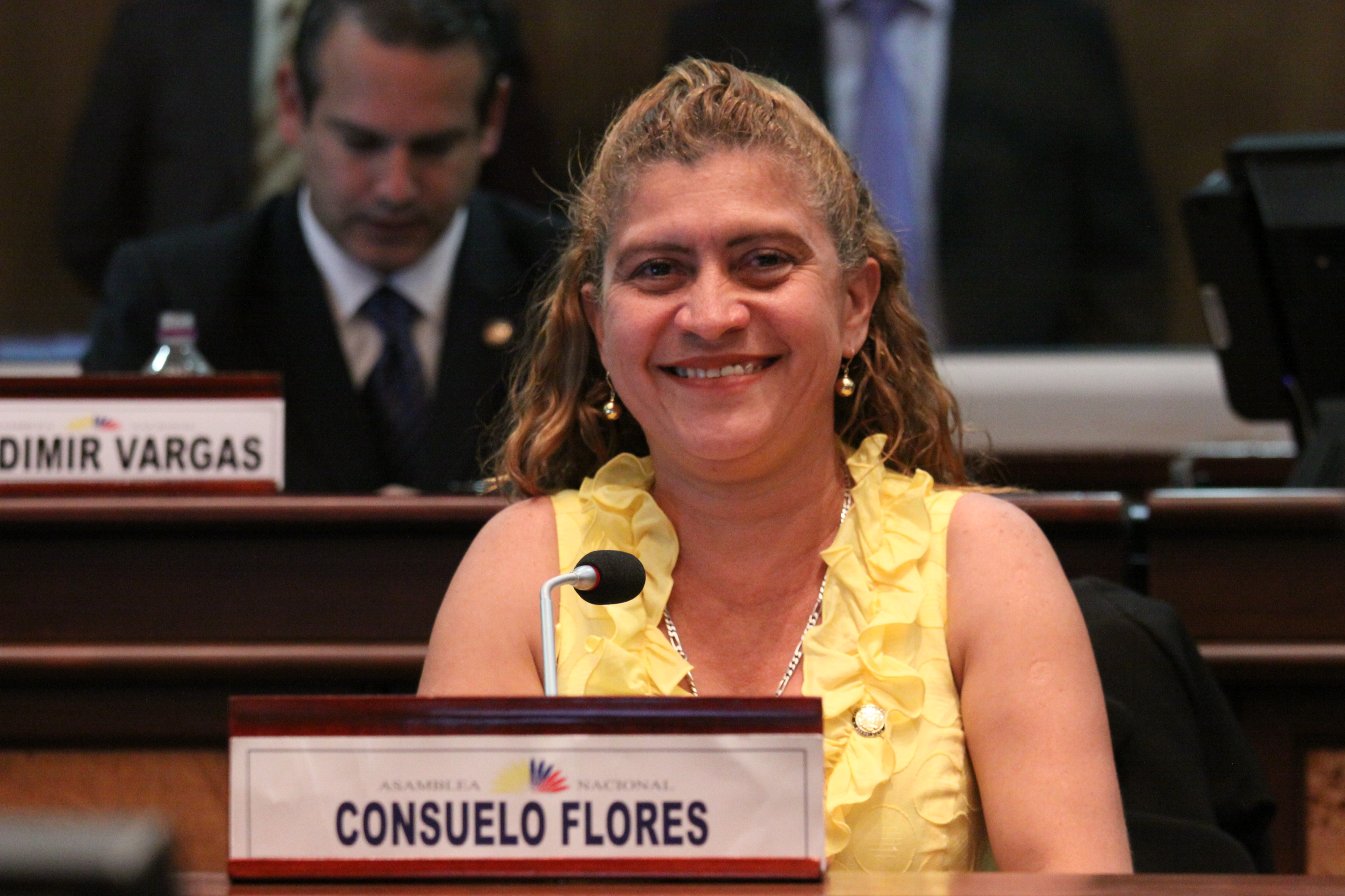 Foto: Hugo Ortiz Ron / Asamblea Nacional